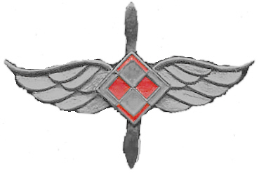 Własna praca Kwz